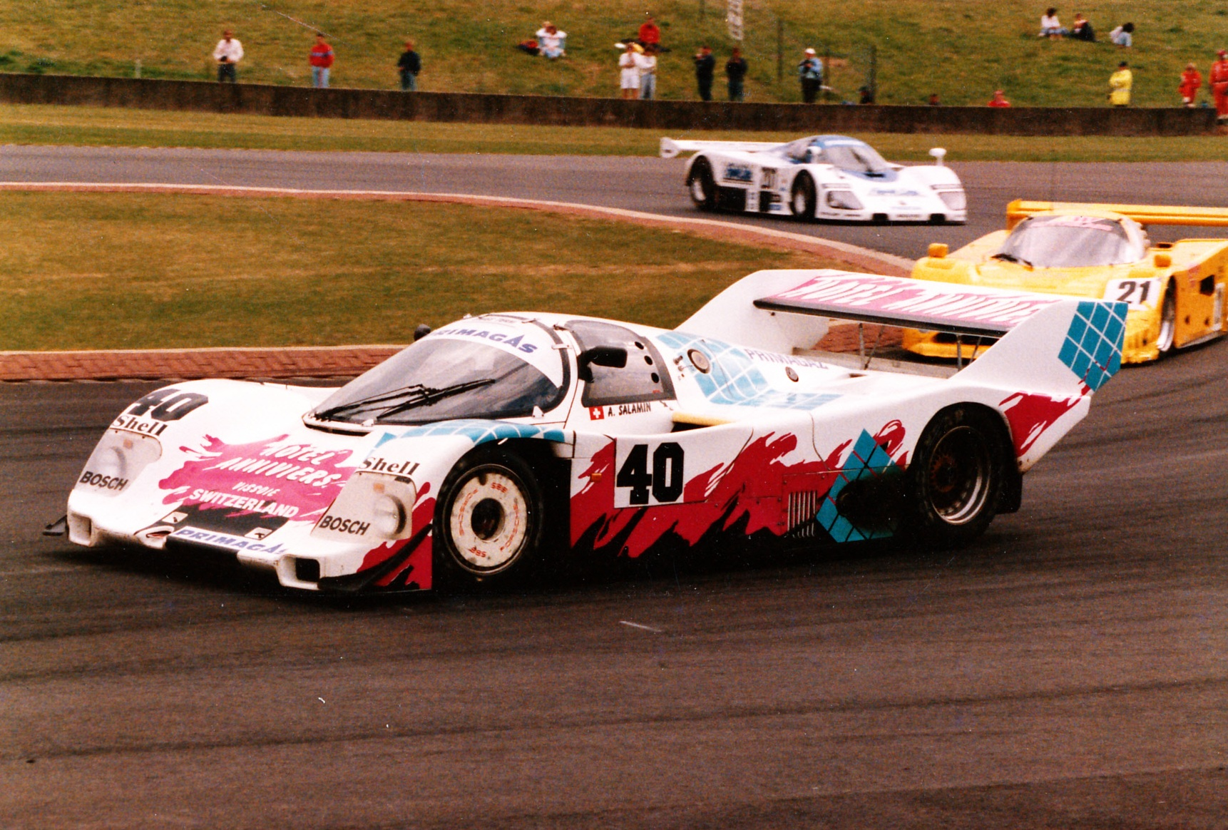 Salamin lors des 480 km de Donington en 1989